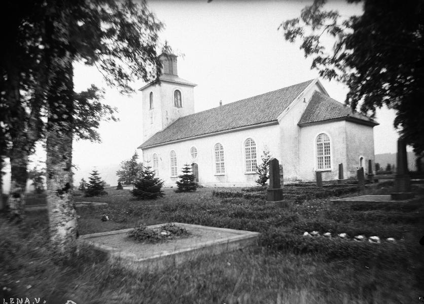 Kyrkan från sydöst. Snabbinv.